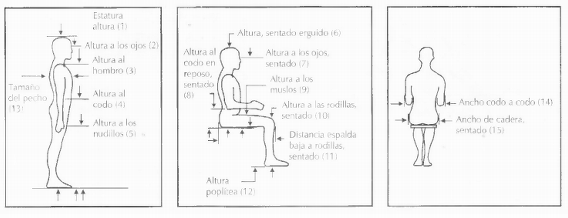 Dimensiones antropometrícas